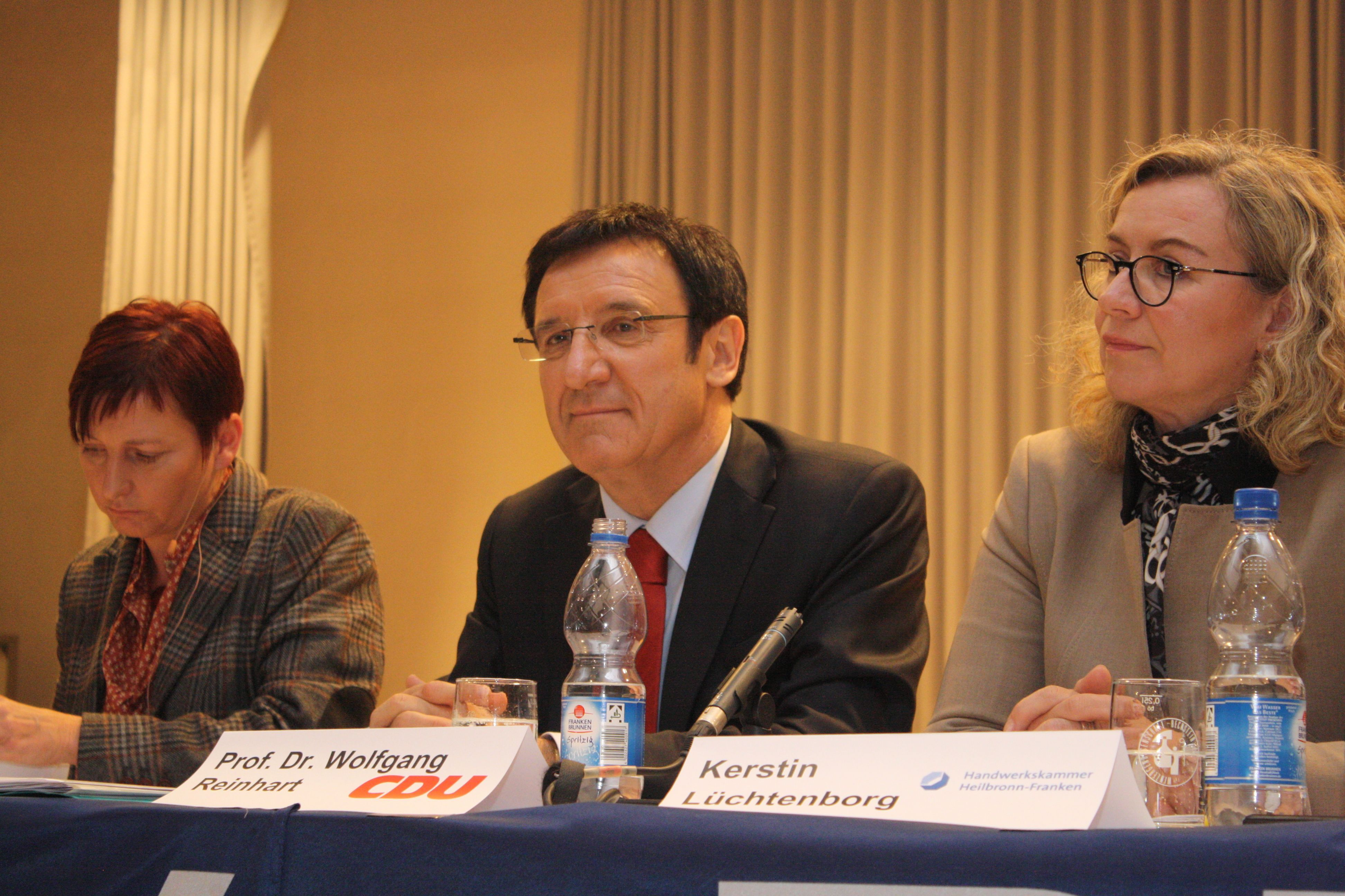 Heike von Brandenstein, Wolfgang Reinhart und Kerstin Lüchtenborg auf einer BLV-Podiumsdiskussion in Tauberbischofsheim 2012